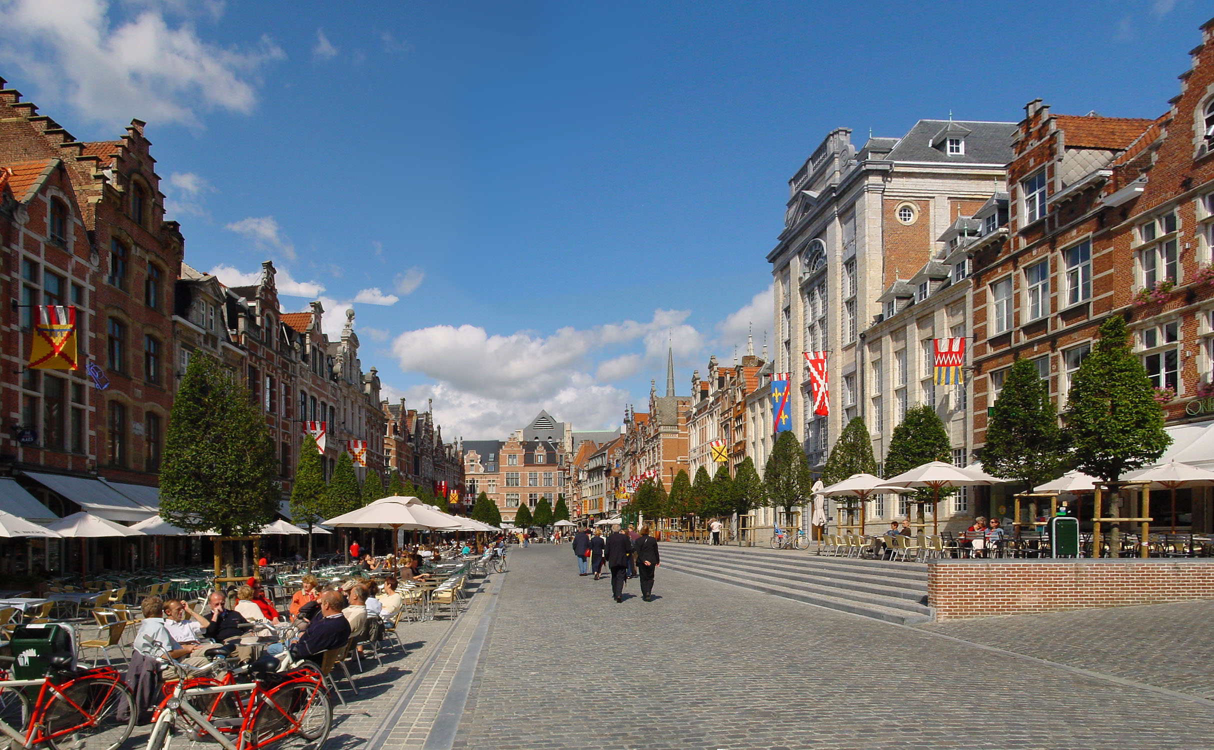 Oude Markt te Leuven, kijkrichting NNO